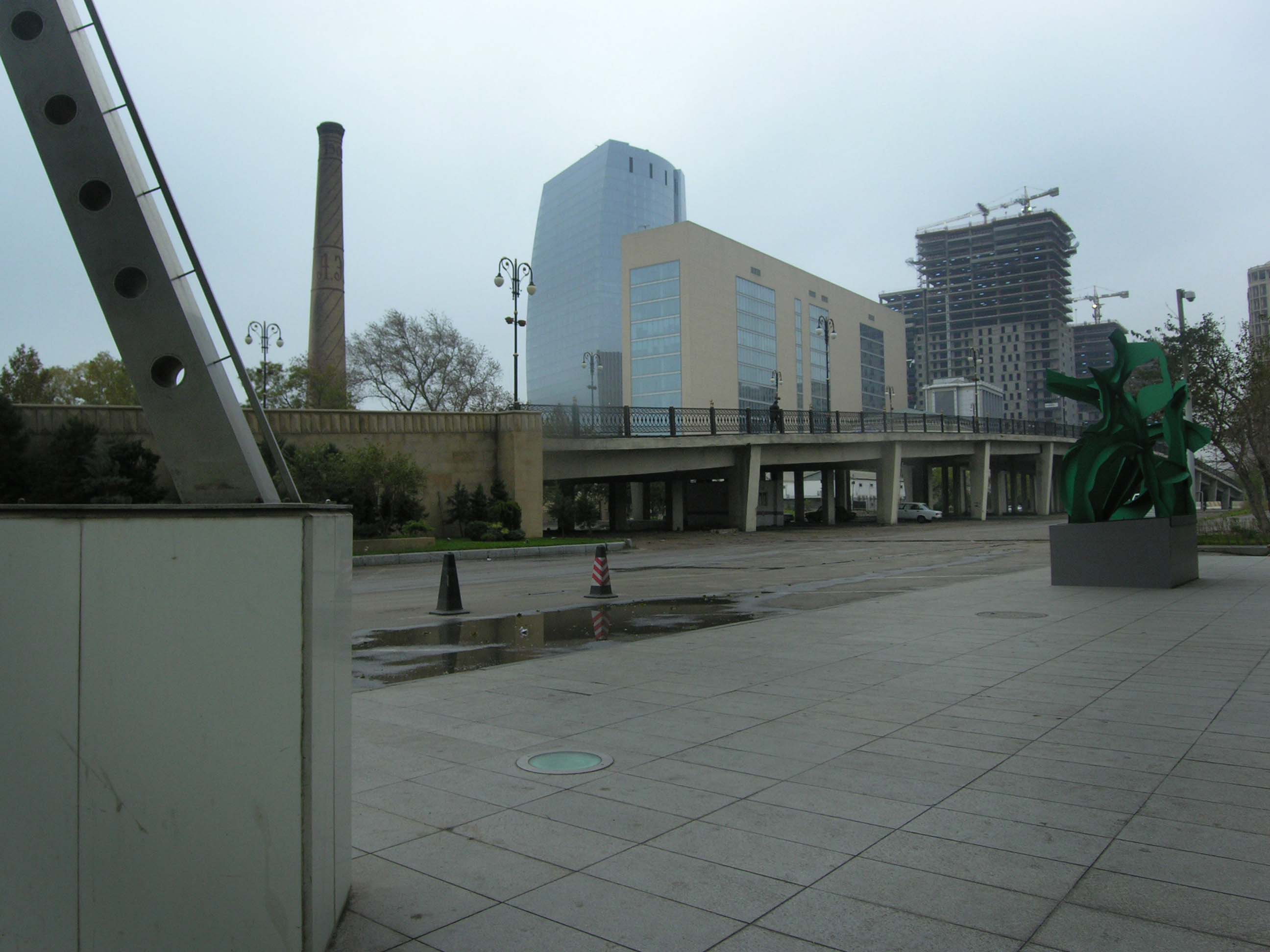 Outside